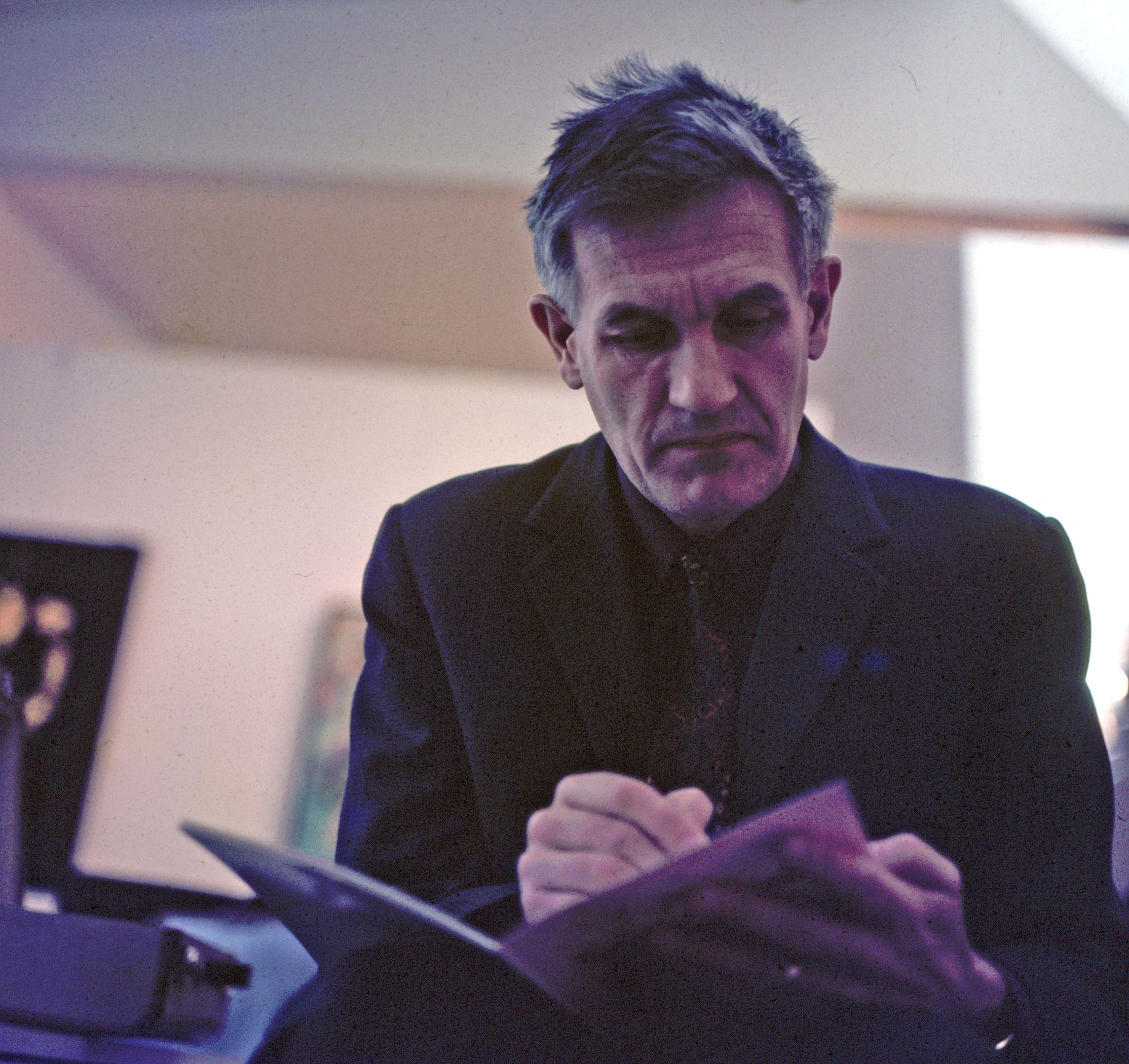 Bernard Schultze im Kölner Kunstverein 1968